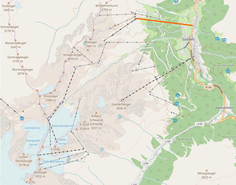 Verlauf der Giggijochbahn auf Basis von OpenStreetMap This map may be incomplete, and may contain errors. Don't rely solely on it for navigation.